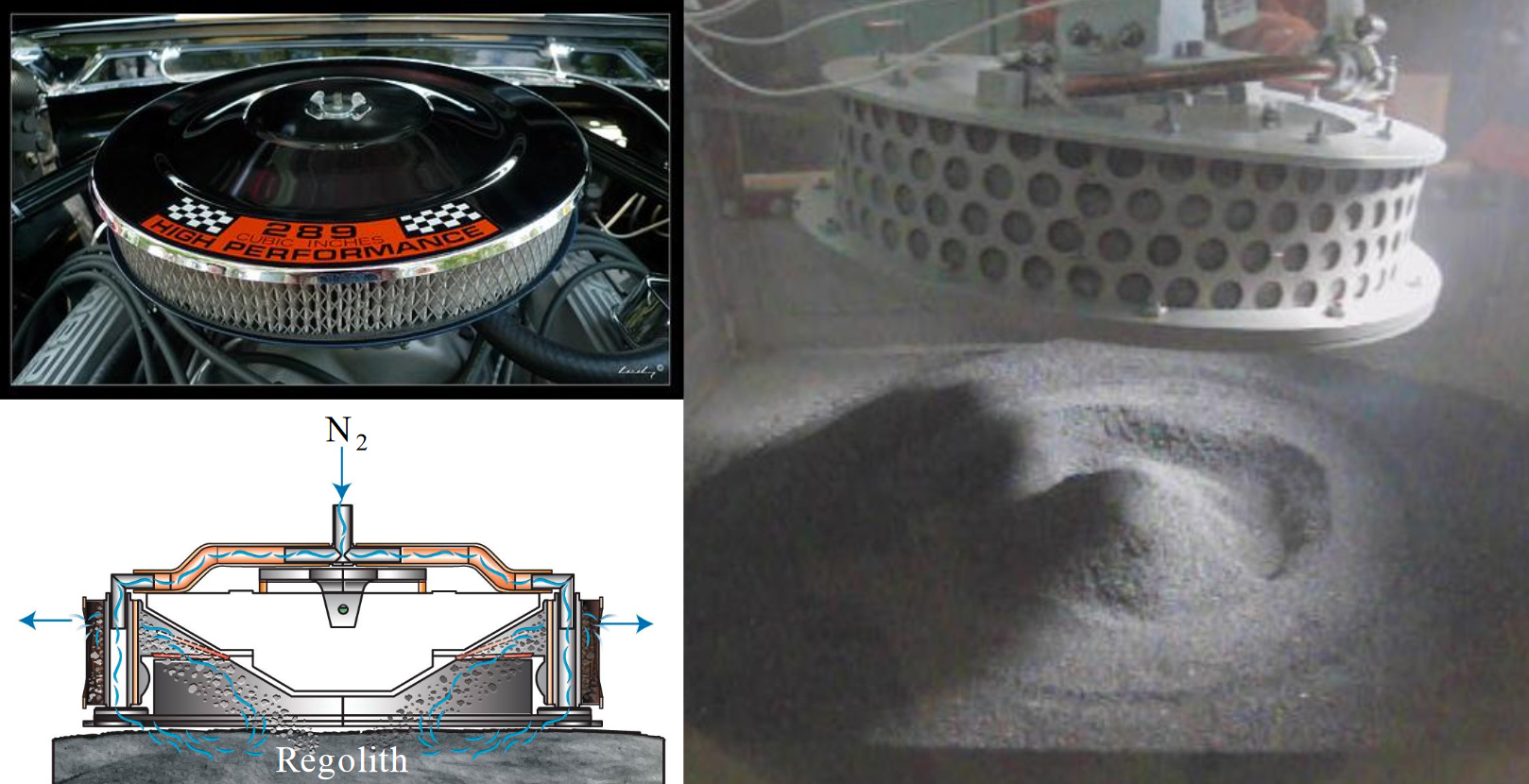 Système de prélèvement TAGSAM de la sonde spatiale de la NASA OSIRIS-REX